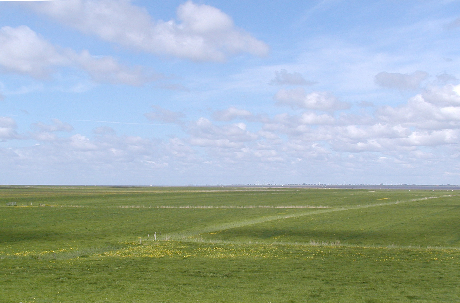 Das Gebiet der Belumerschanze heute